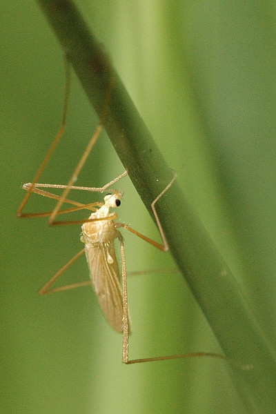 Erioptera flavata from Commanster, Belgian High Ardennes .